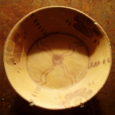 Plato de cerámica mixteca Rojo sobre Bayo. Procede de la Mixteca Alta (Oaxaca), cultura mixteca, período Preclásico (ss. XVI a. C.-II d. C.). Colección del Museo Nacional de Antropología (México).